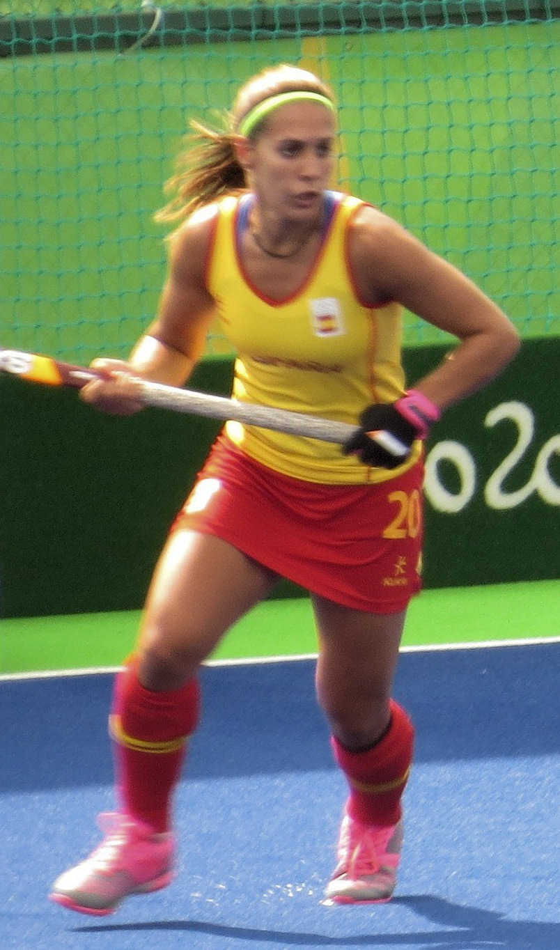 Rio 2016.Hóquei na grama. Feminino. Holanda x Espanha. sx 86